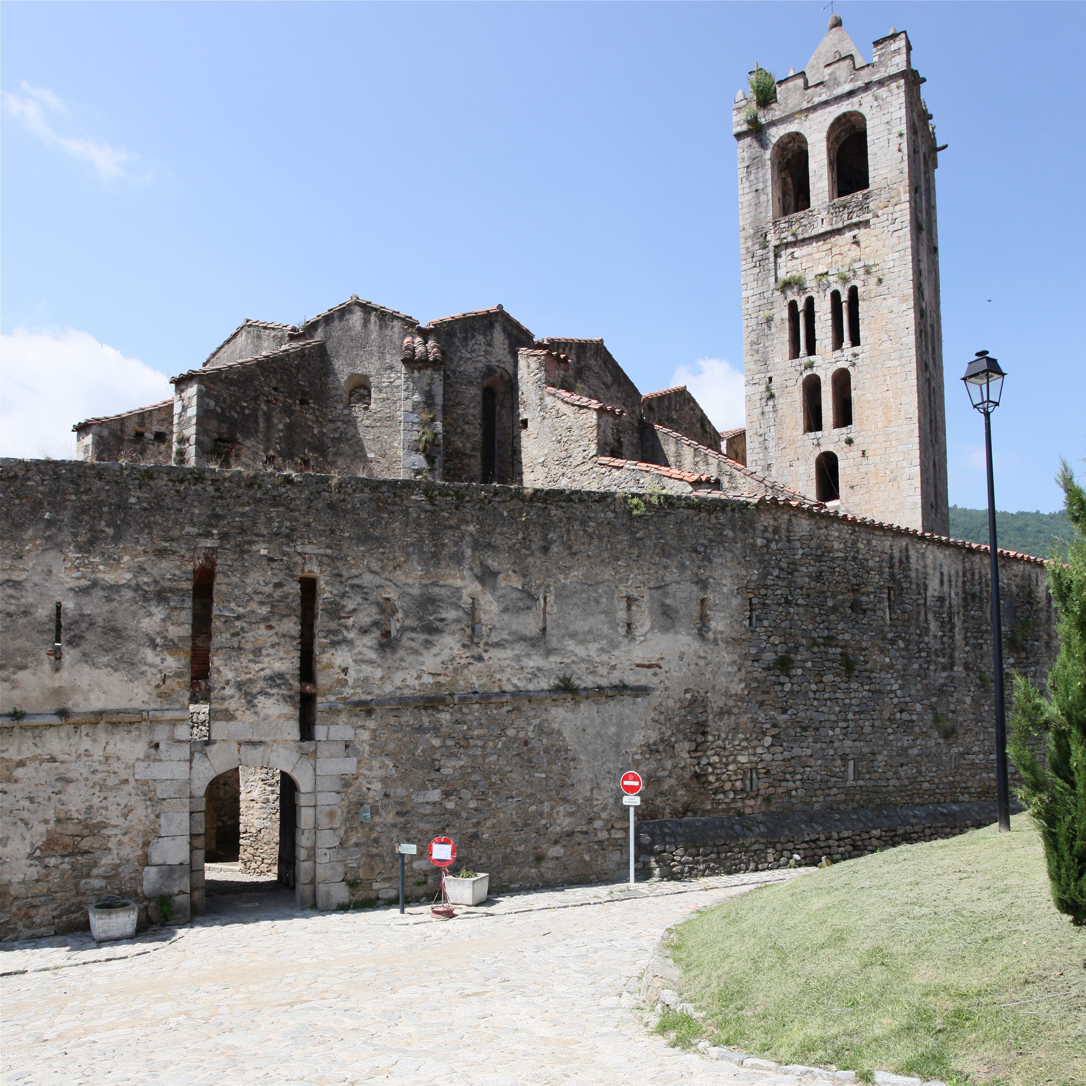 Prats de Mollo (66, France) : l'église vue depuis le chemin couvert montant vers le fort Lagarde.